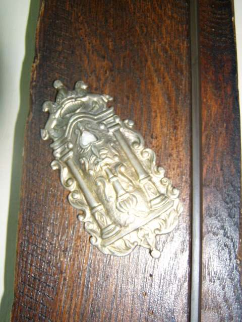 Chewra Lomdei Misznajot Synagogue in Oświęcim